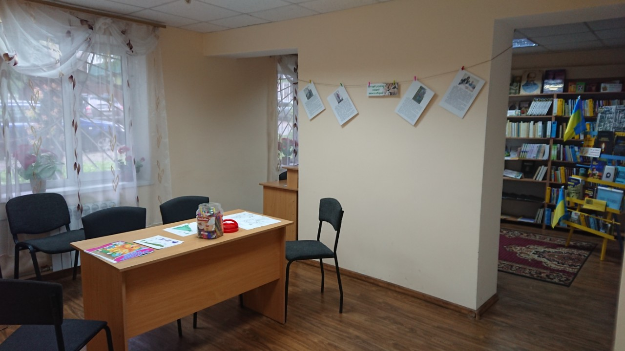 Історії успіху читаців бібліотеки